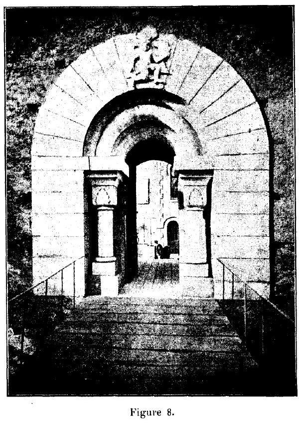 Le Donjon de Courmenant, ses origines, ses seigneurs et possesseurs, son musée